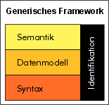 Frameworks-Metadaten-Generisch